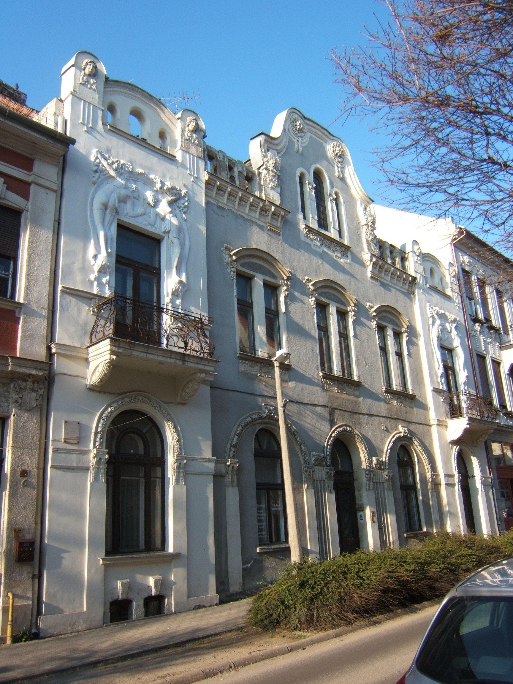 az Ádám–Éva-ház Kaposváron This is a photo of a monument in Hungary. Identifier: 7922